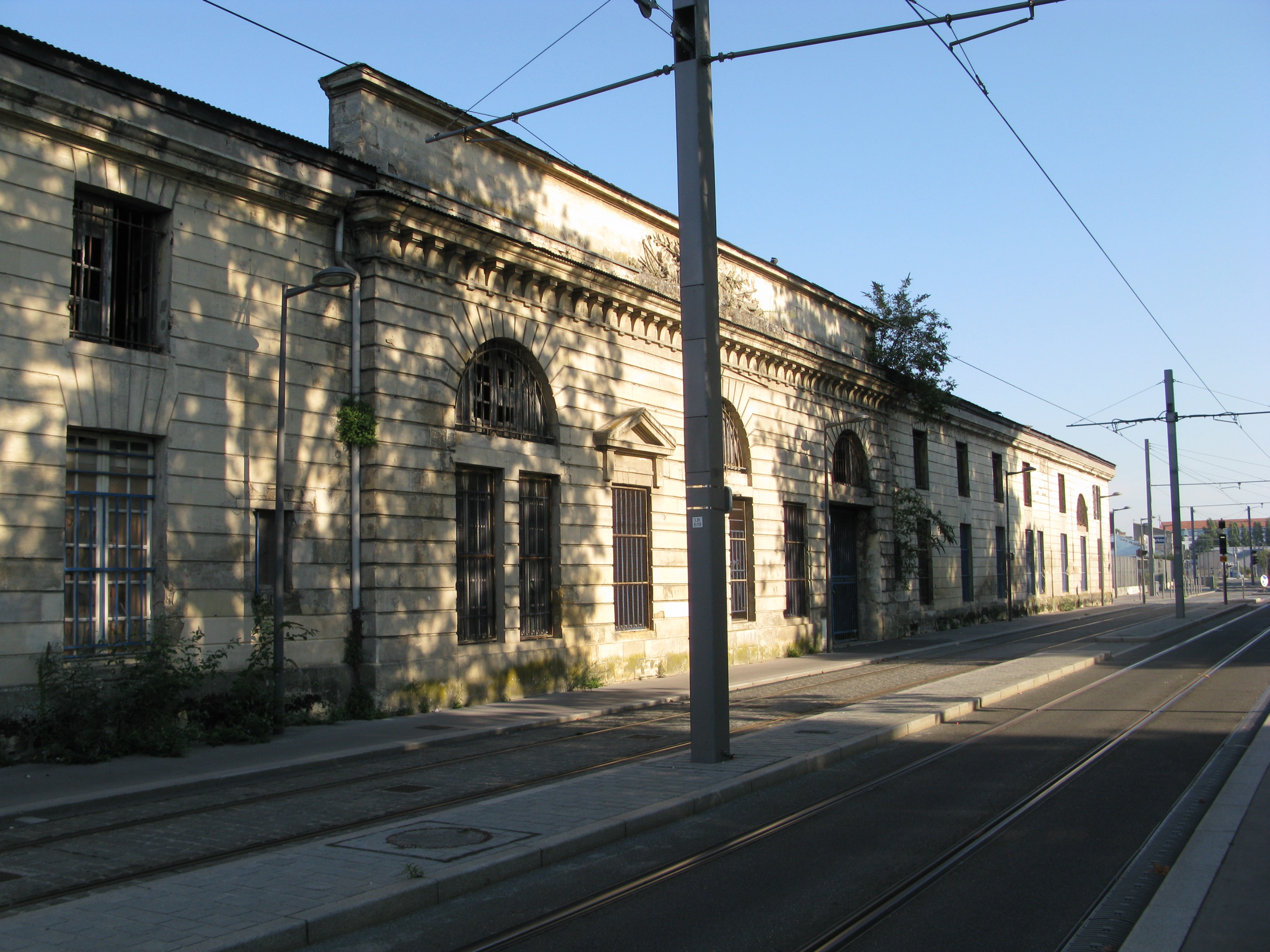 Ancien magasin aux vivres de Bordeaux.